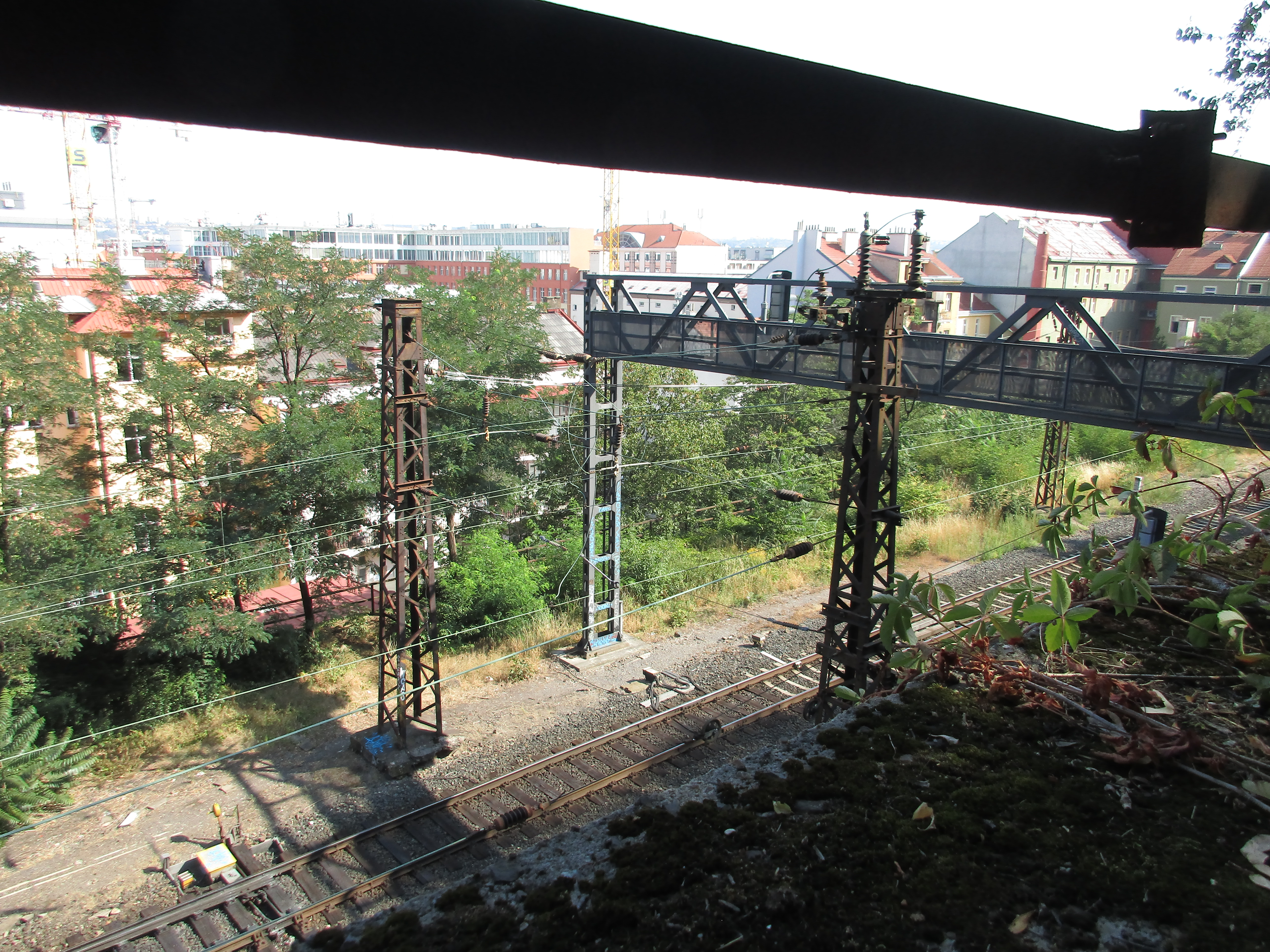 Trať 011 v Praze-Karlíně - pohled od Vítkova.